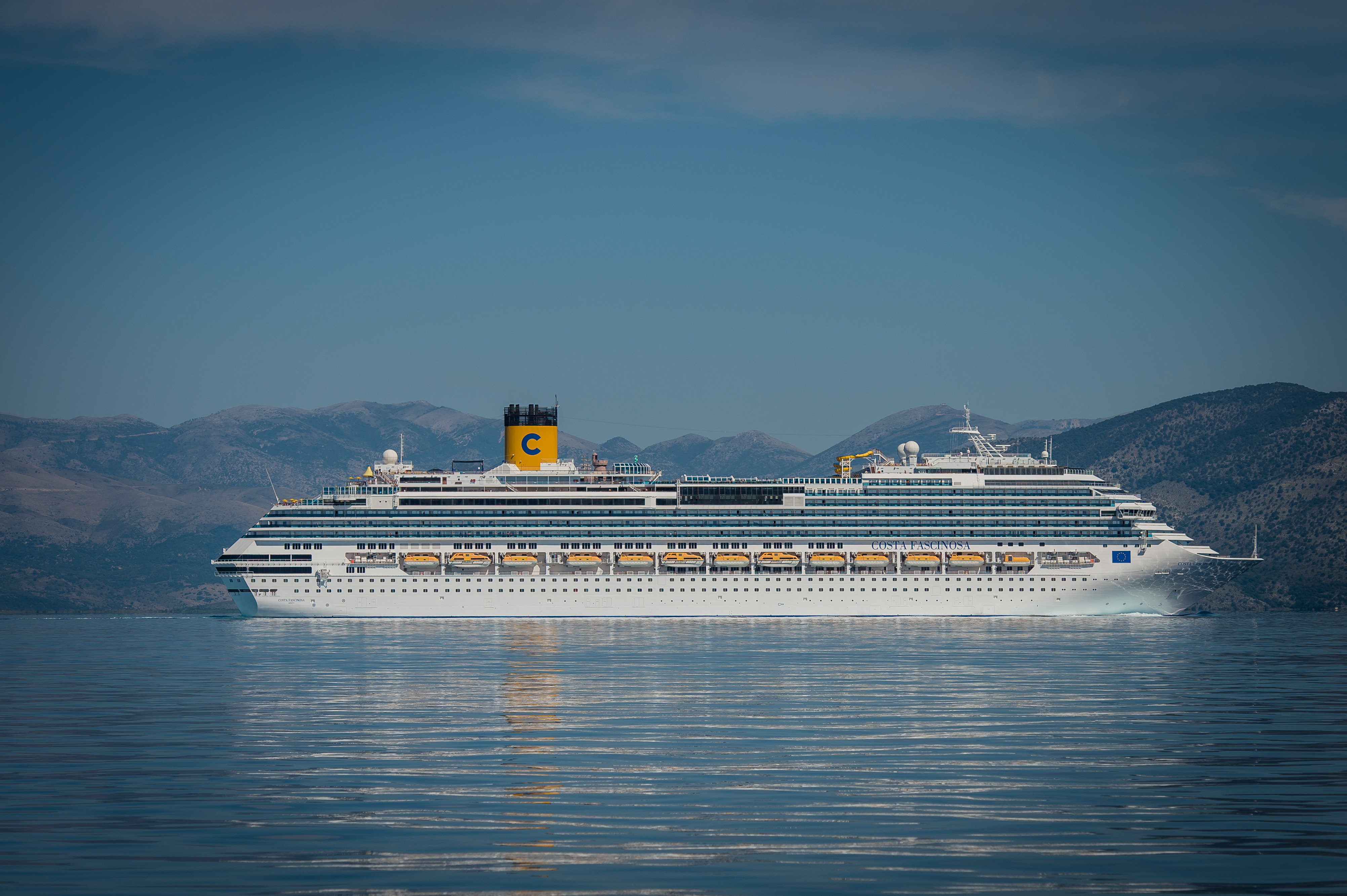 Costa Fascinosa vor Korfu (Griechenland)